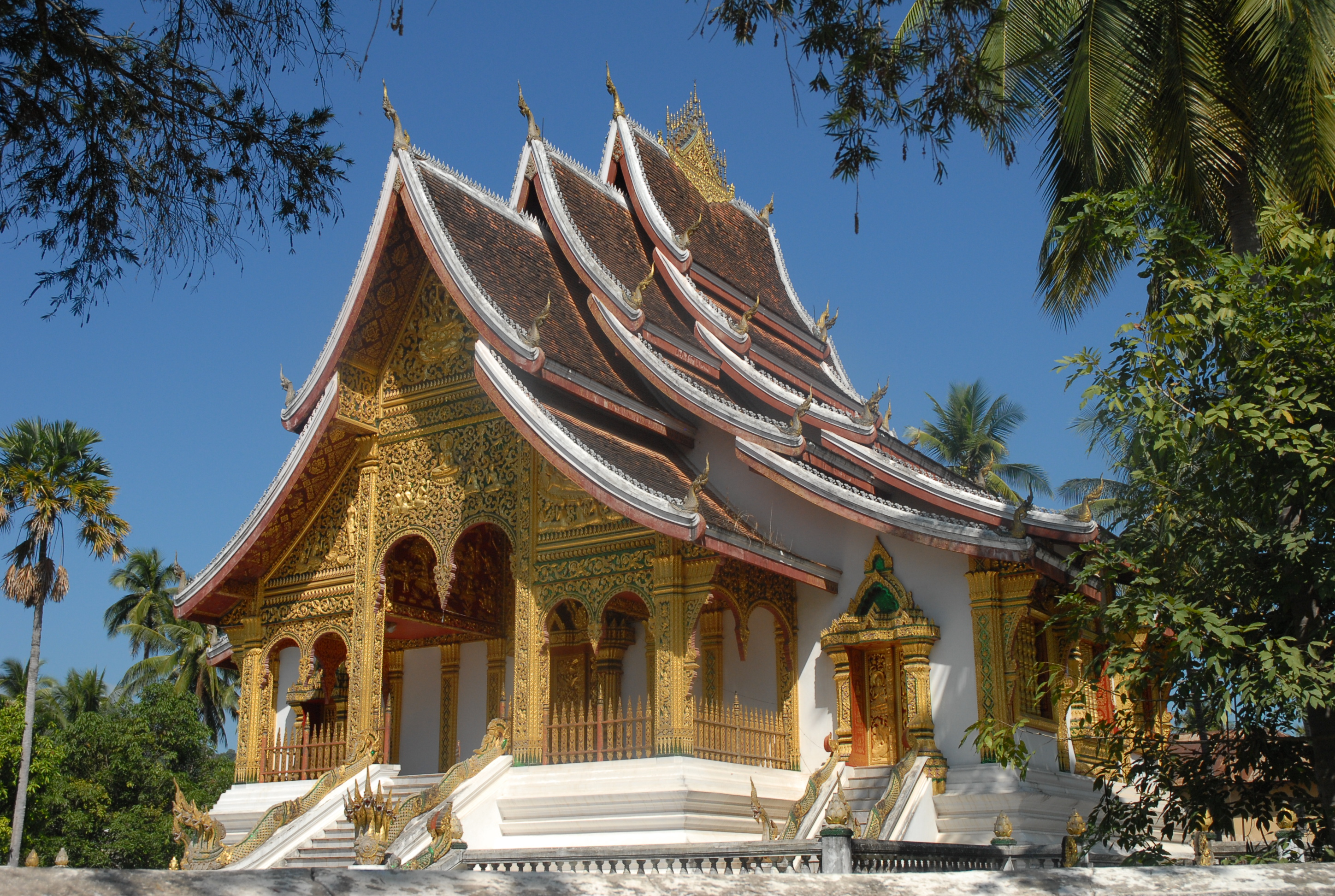 Luang Prabang : pagode dans l'enceinte de l'ancien palais royal